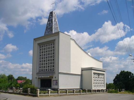 Kościół w Grabnie